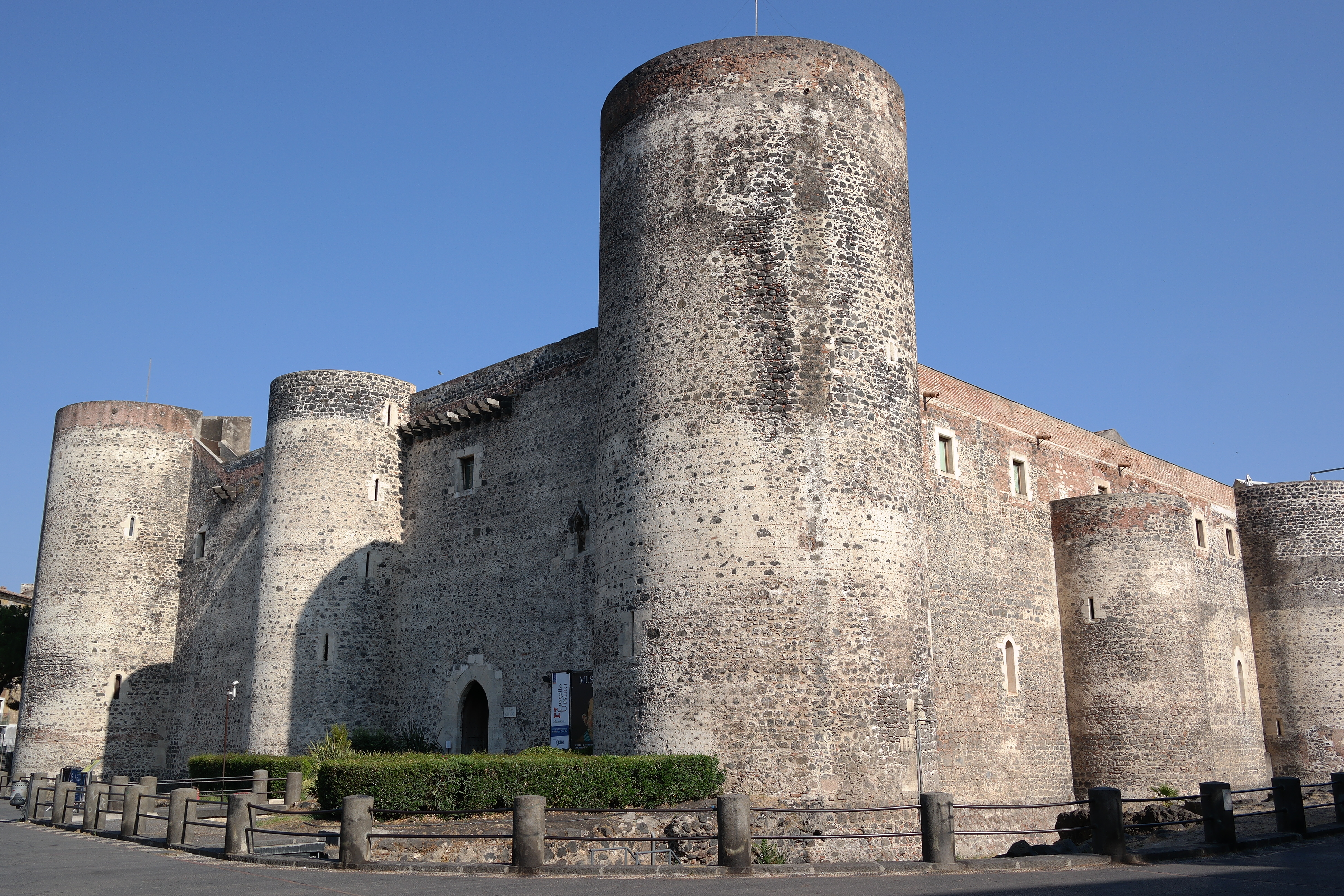 Castello Ursino a Catania